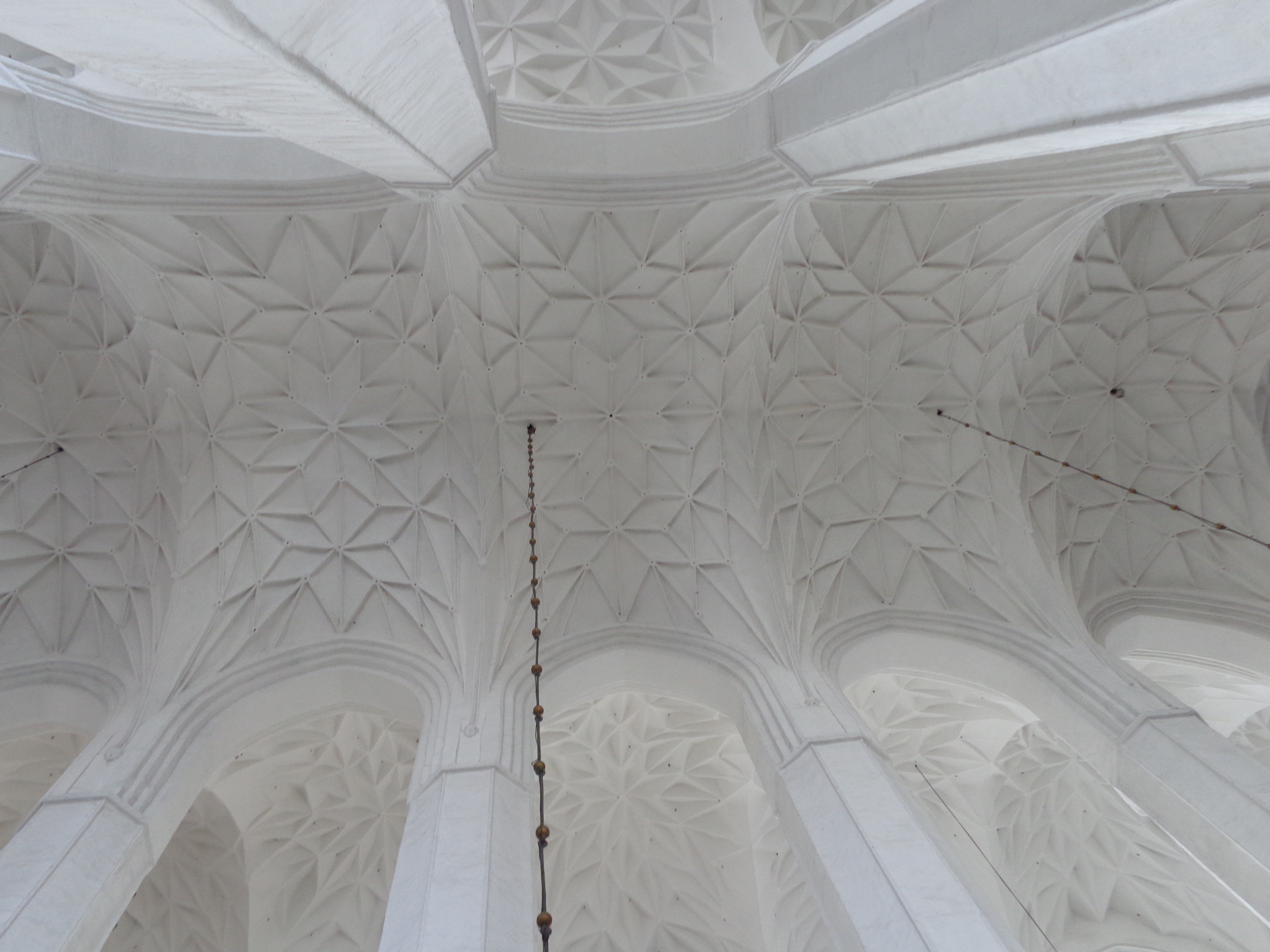 Gdańsk Główne Miasto - zespół bazyliki konkatedralnej p.w. Wniebowzięcia NMP (Kościoła Mariackiego), 1343, 1502